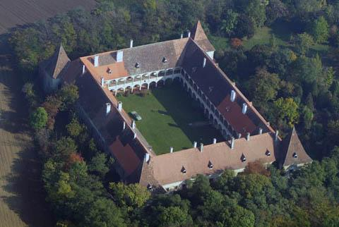 Deutschkreuz, Austria, aerial photography